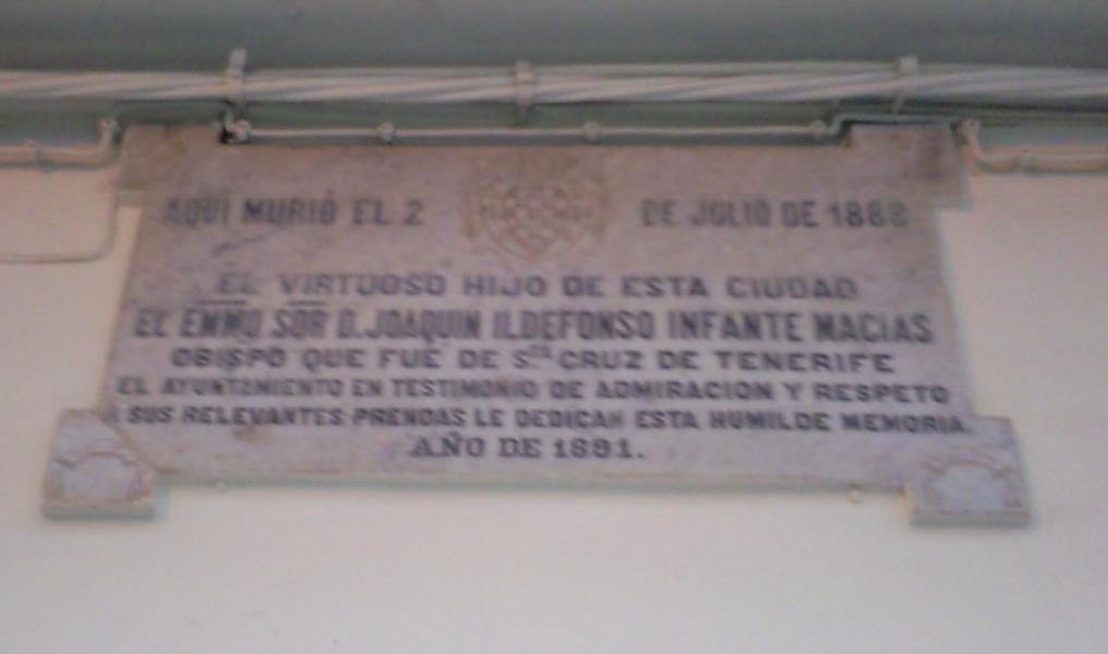 Placa homenaje al Obispo Idelfonso Infante Macías en la calle dedicada a su nombre.